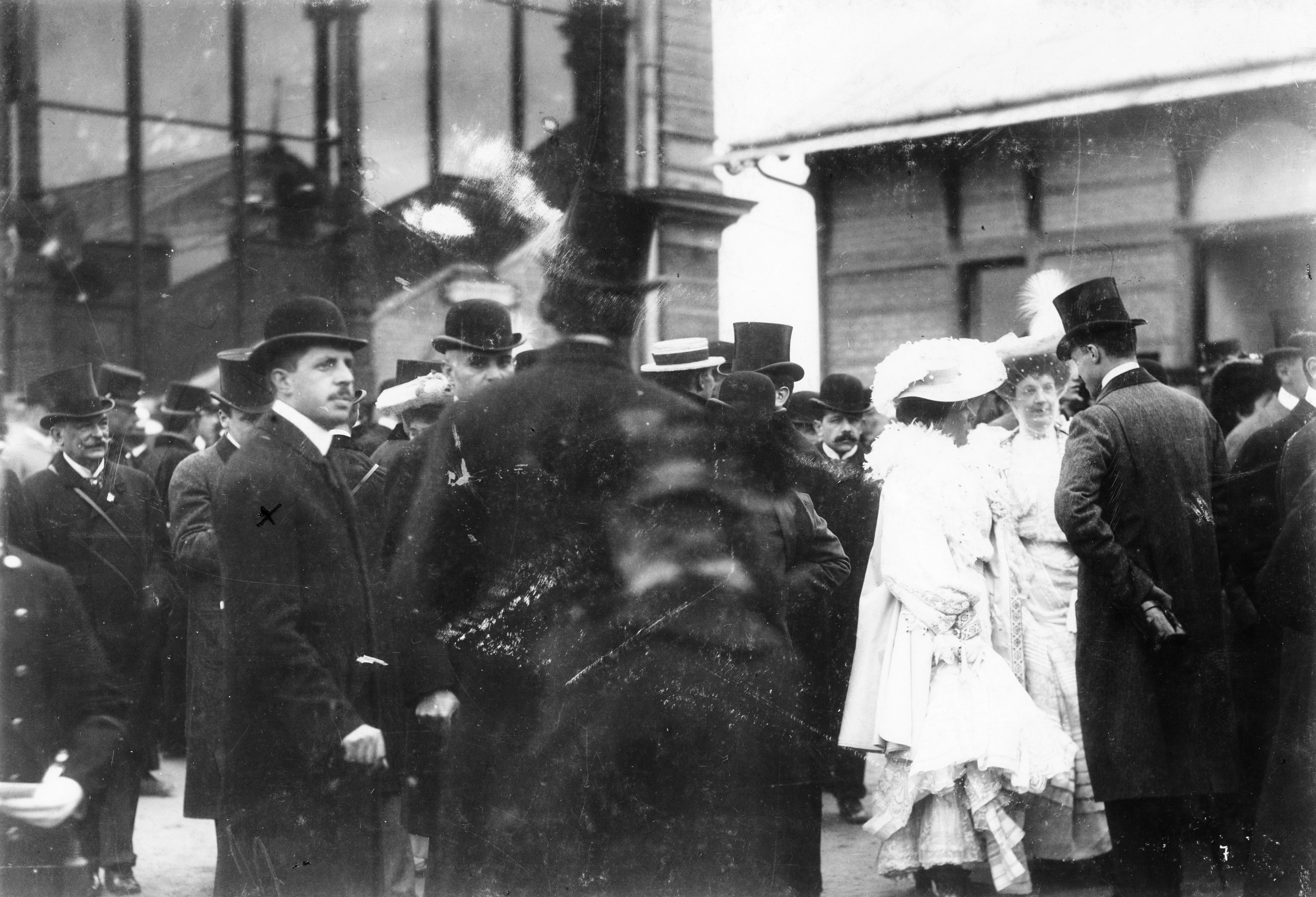 Magyar Elek a Derby-n. Location: Austria, Vienna Title: Magyar Elek a Derby-n.